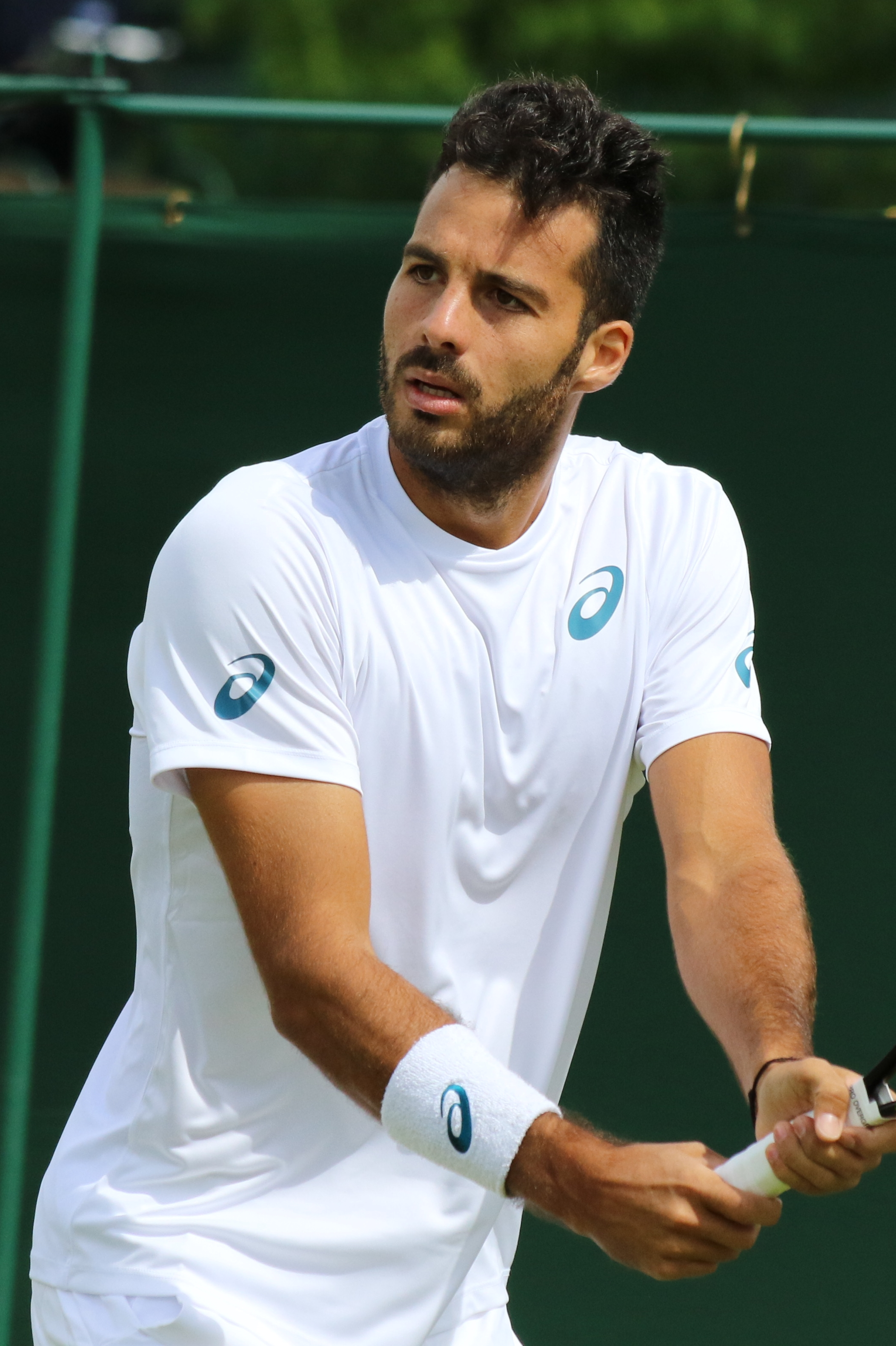 Caruso WMQ16 (12)